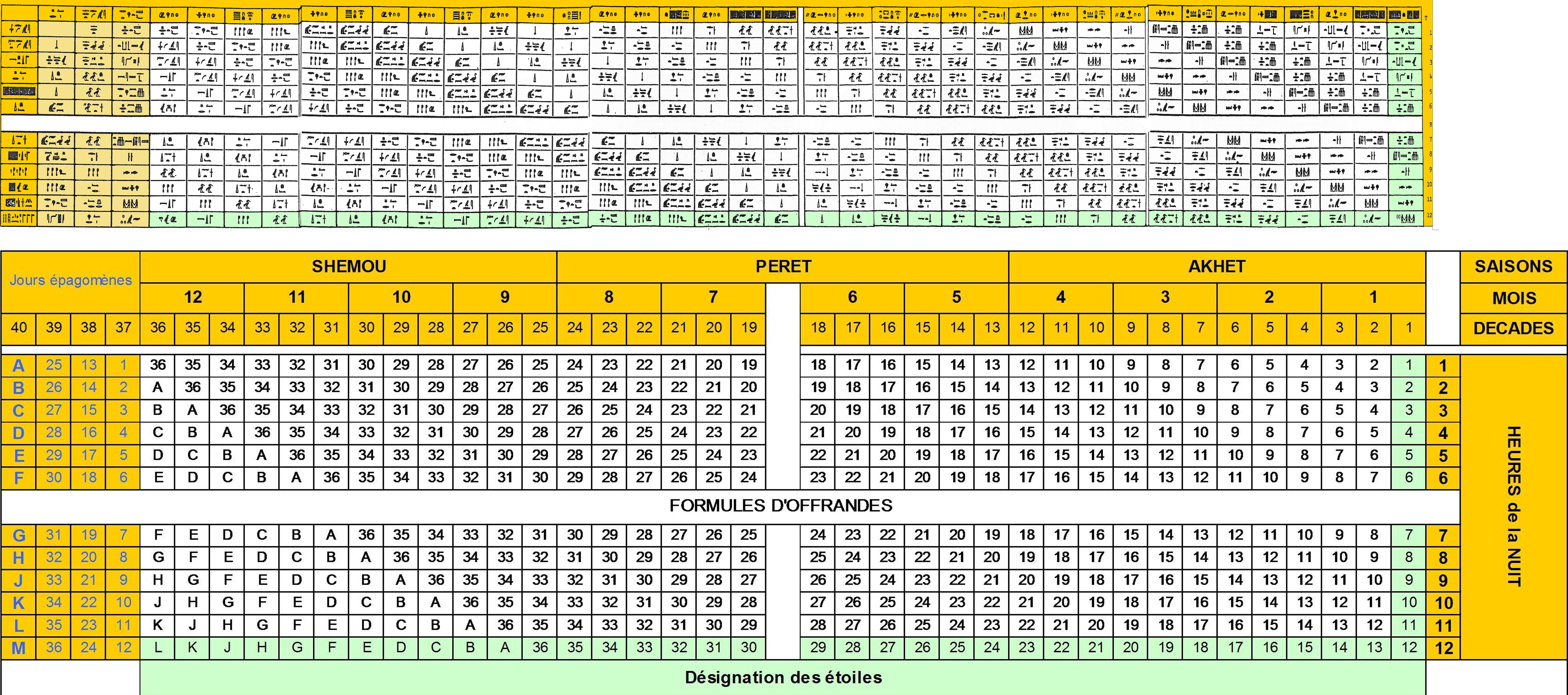 Table stellaire égyptienne. Adaptation des tables de Neugebauer et Parker ("Egyptian Astronomical Texts") et de la table de Mesheh (d'après Pierre Lacau)